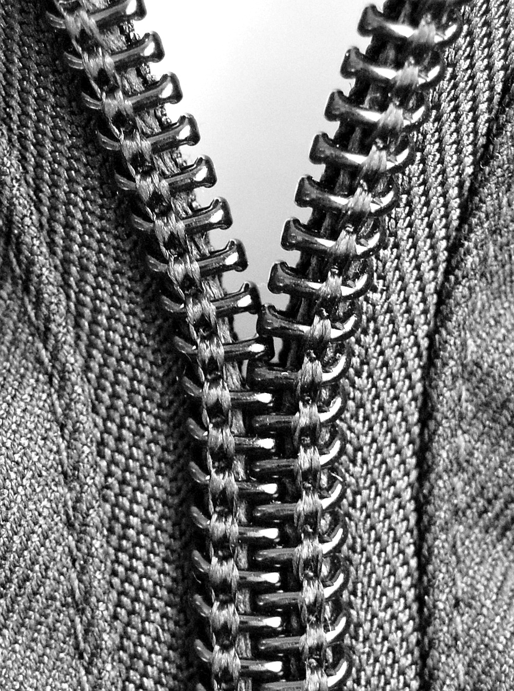 Durch die an der Krümmung der Helixspirale entstandene Verdickung hält der Reißverschluss zusammen